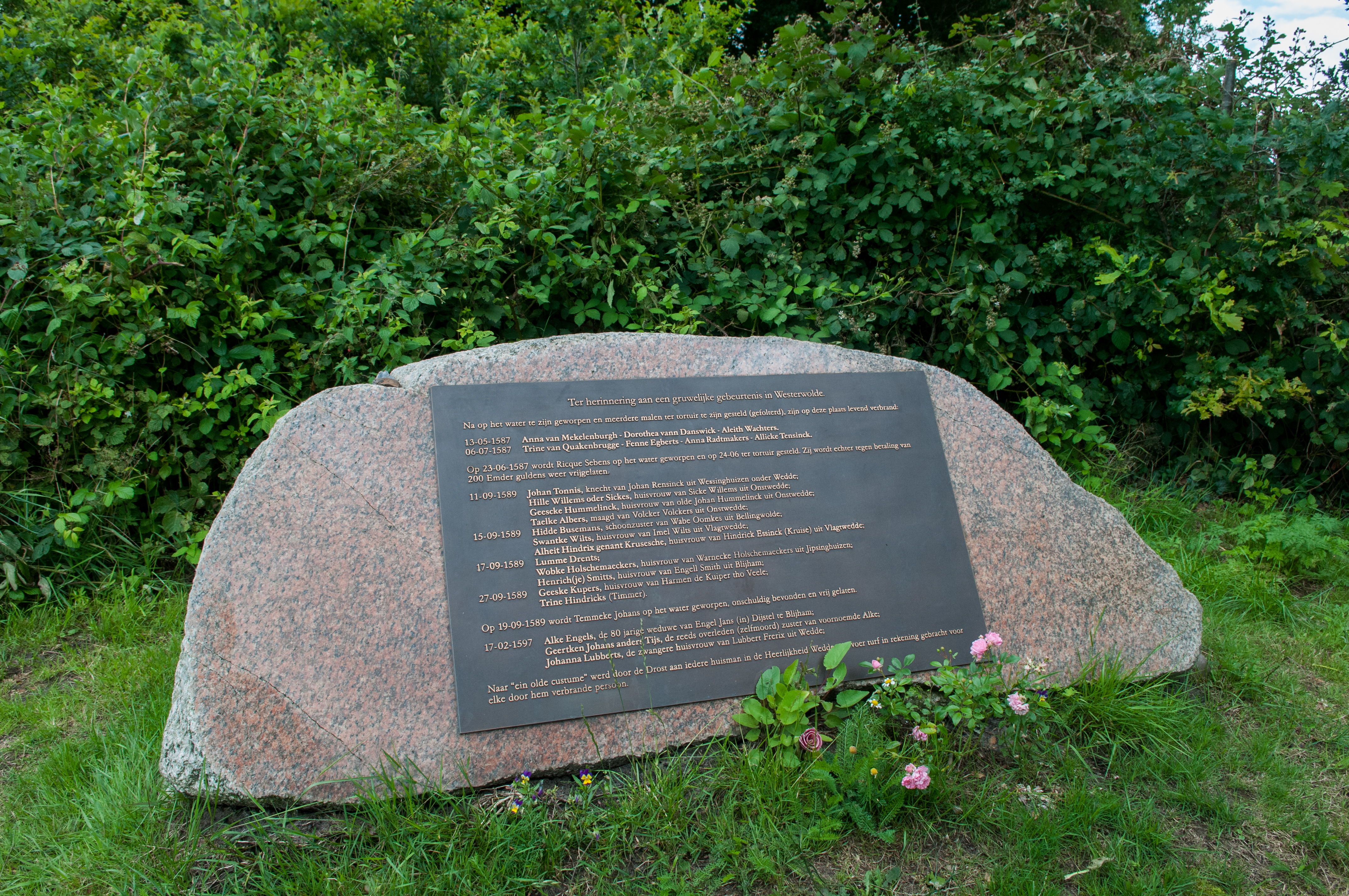 Aan de voet van de Geselberg staat deze gedenksteen met de namen van de heksen die hier levend verbrand zijn.